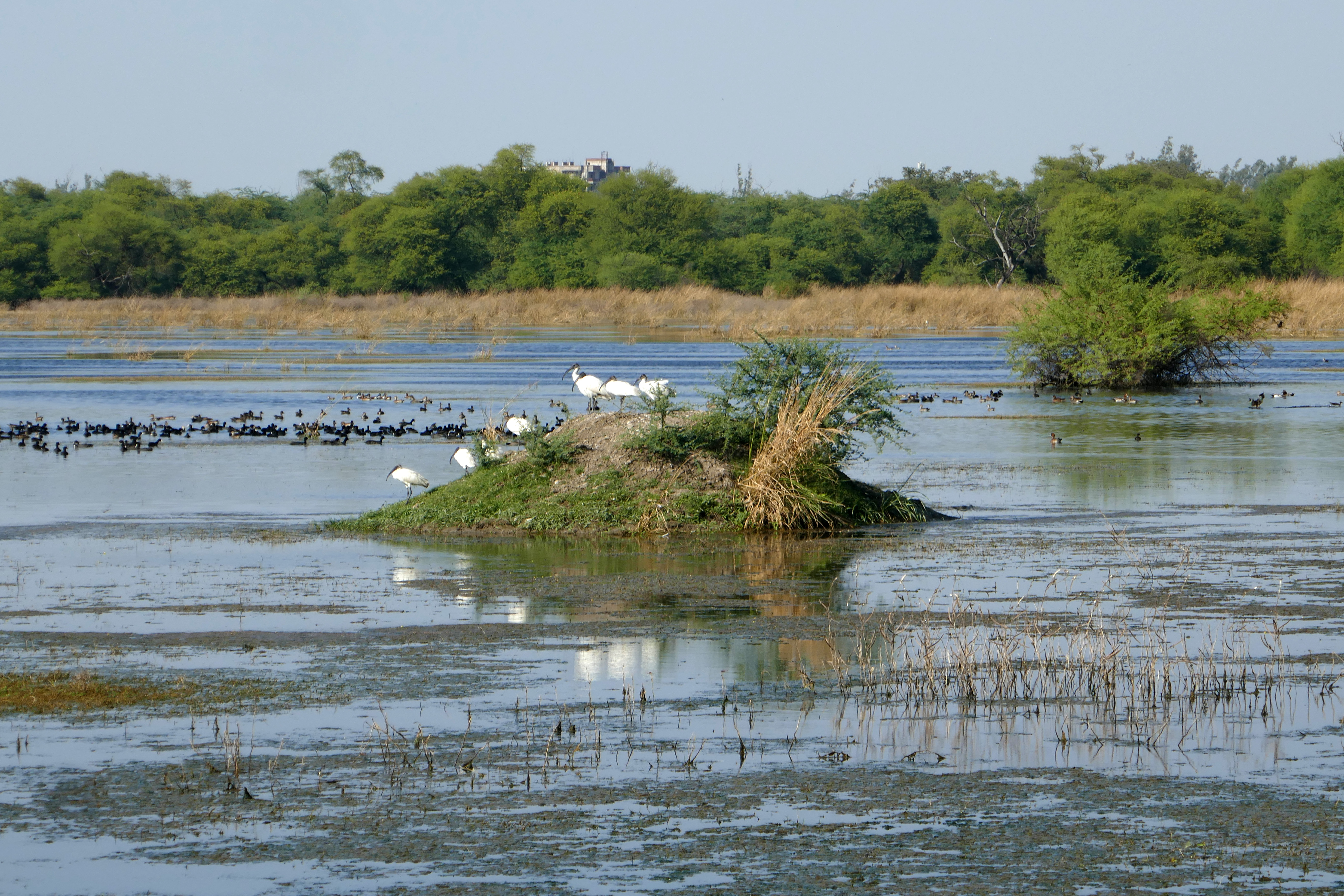 Plan d'eau au parc national de Keoladeo (Rajasthan)